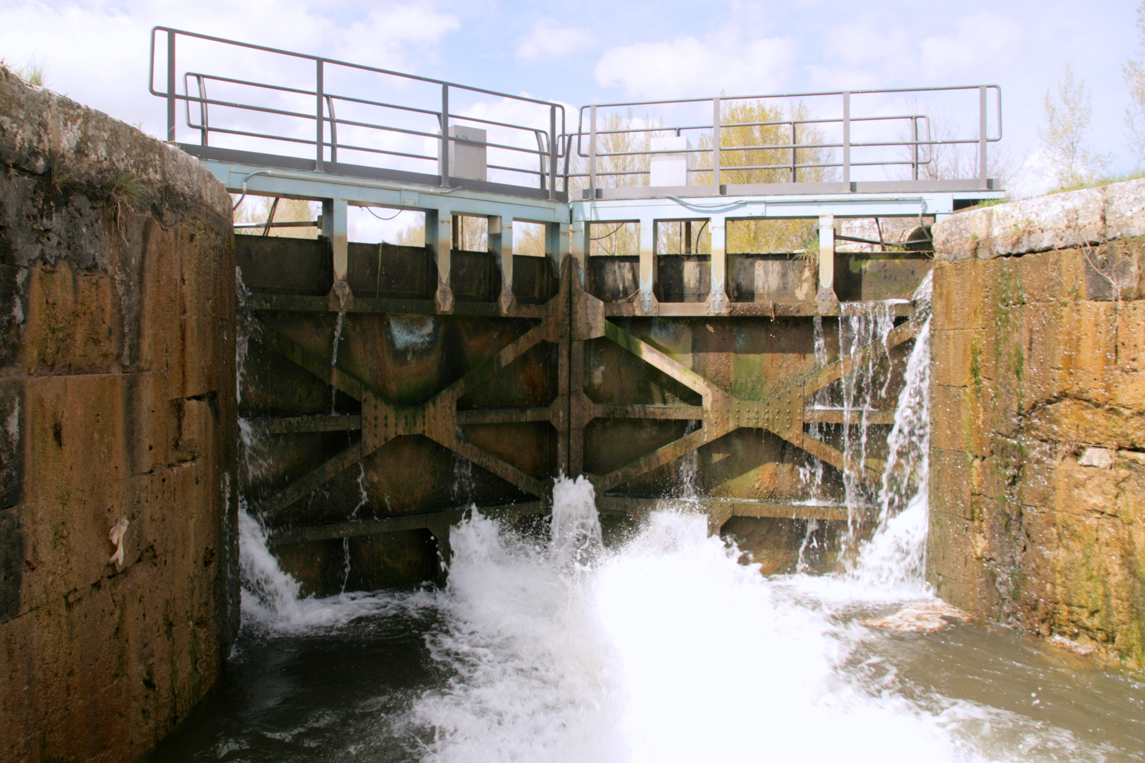 Llenado de la sexta esclusa del canal de Castilla